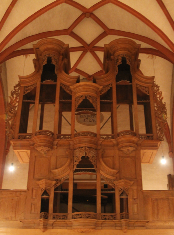 Leeres Stumm-Orgelprospekt in der Simultankirche Bechtolsheim. Die Pfeifen werden seit September 2014 restauriert.